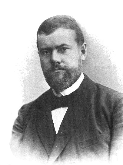 Max Weber